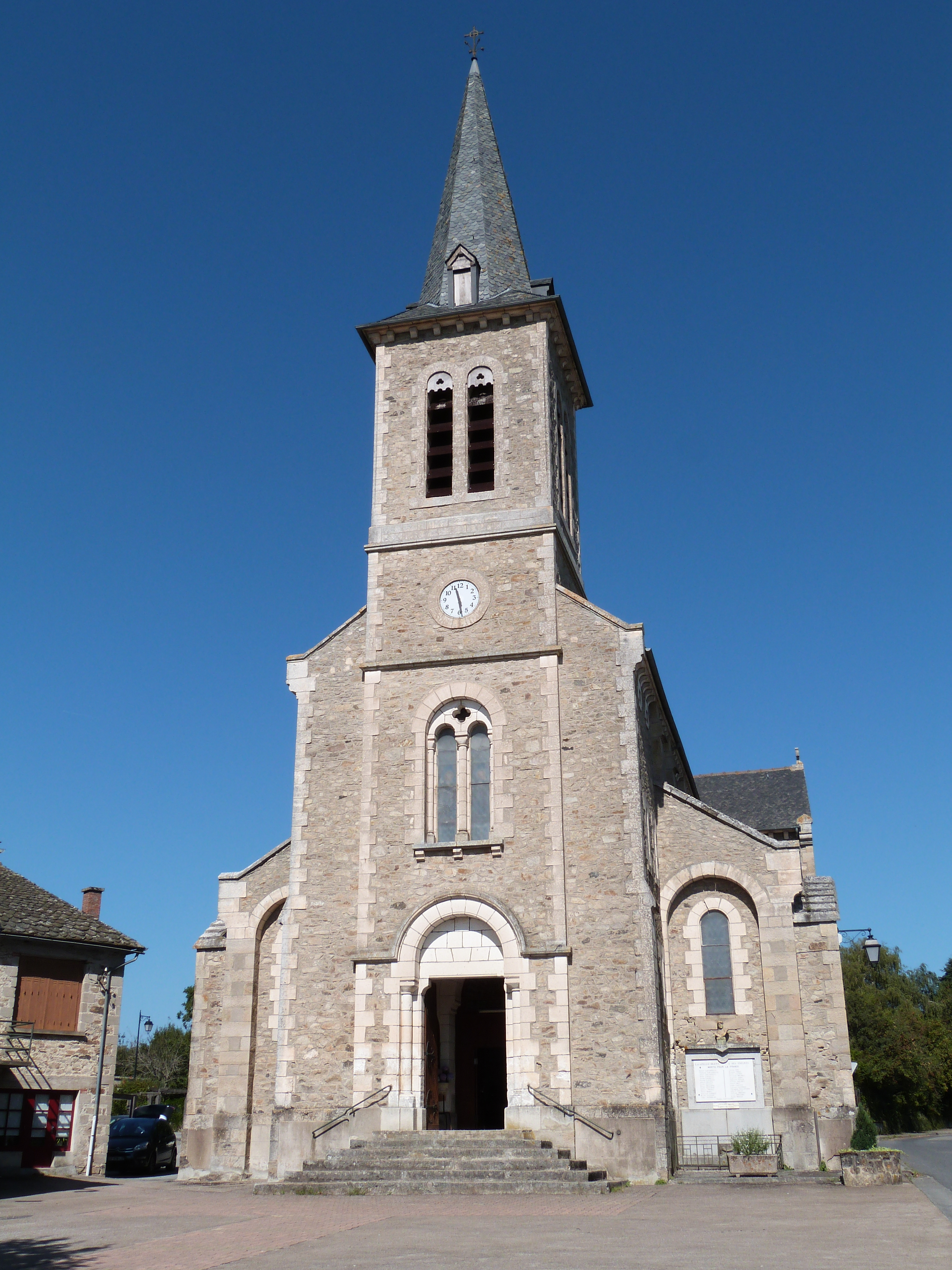 Façade de l'église Saint-Jérôme de La Capelle-Bleys